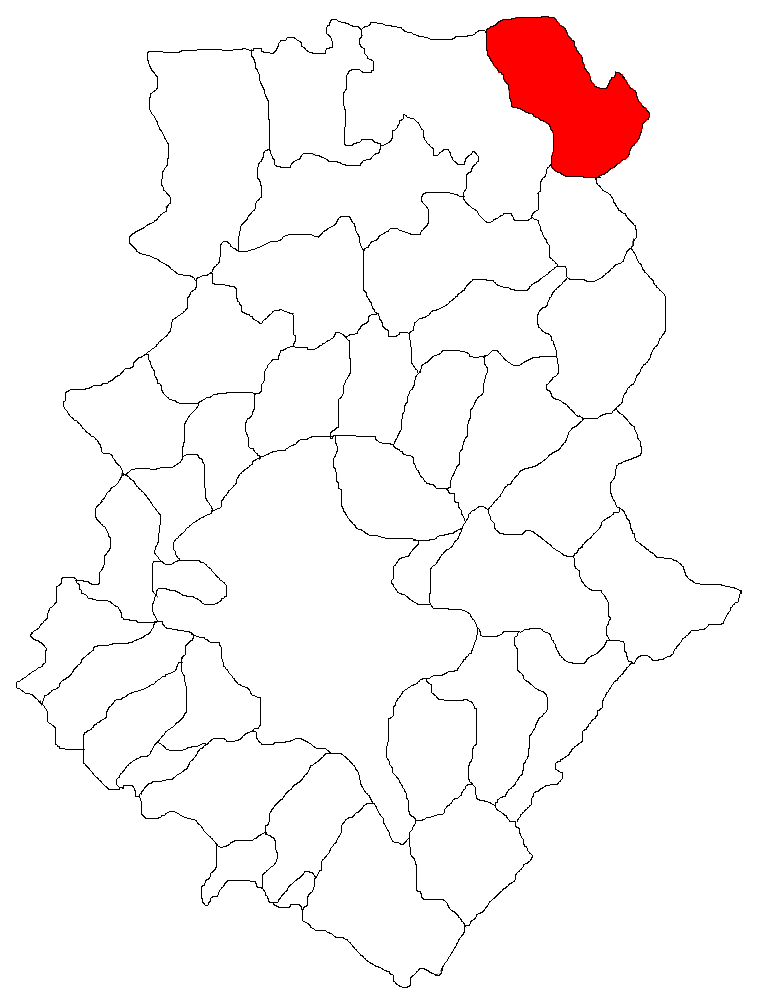 Volapük: Topam in ziläk: Ilfov.